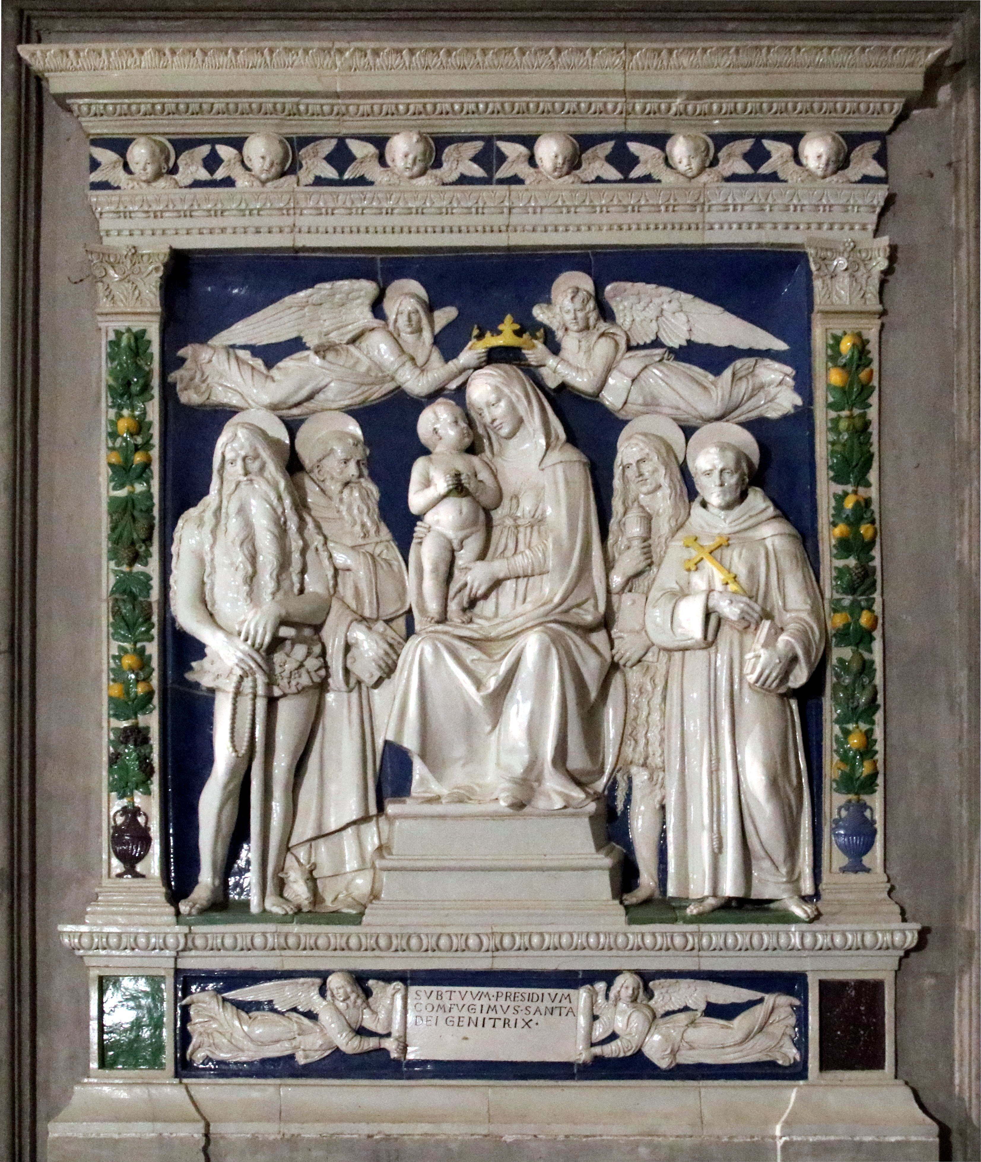 Bottega di Andrea della Robbia, Madonna del Rifugio, 1500-1510, chiesa maggiore (La Verna)